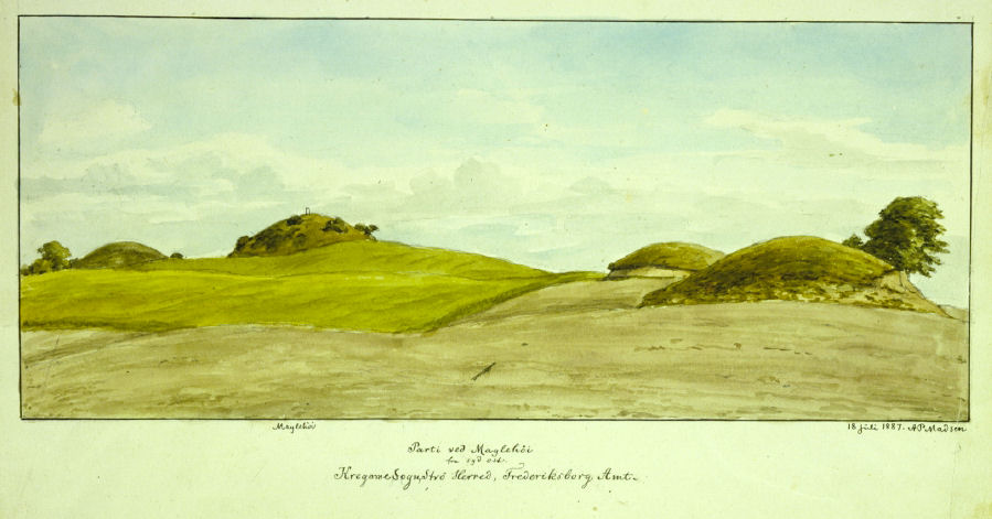 Akvarel af A.P. Madsen 1887: Gravhøje, Maglehøj, Brederød, Kregme sogn, Strø Herred, Frederiksborg Amt.